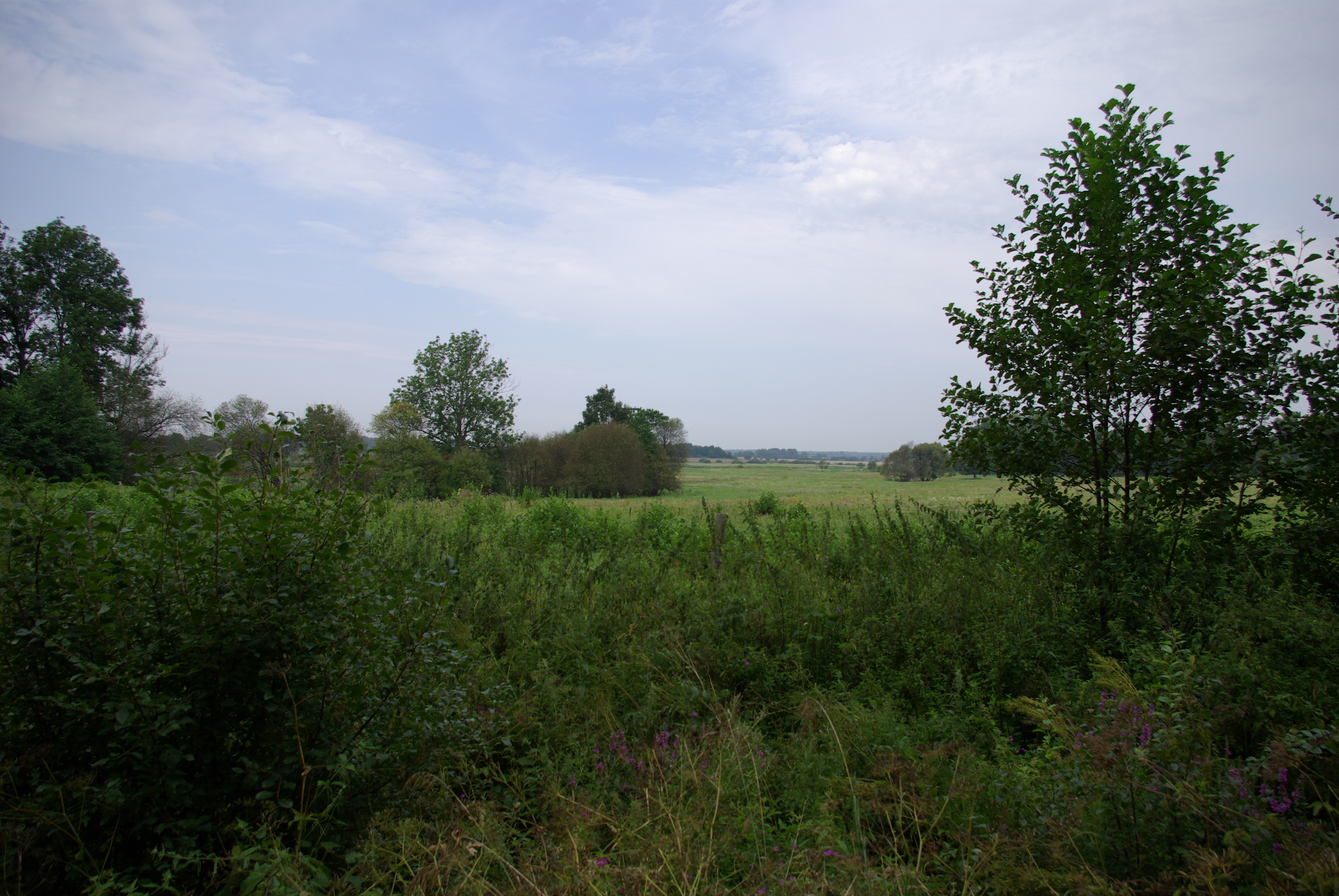 Waldrand des Lasy Skaliskie (dt. Altheider Forst) bei Rapa (Angerapp, 1938-1945: Kleinangerapp) in der Gemeinde Banie Mazurskie (dt. Benkheim)